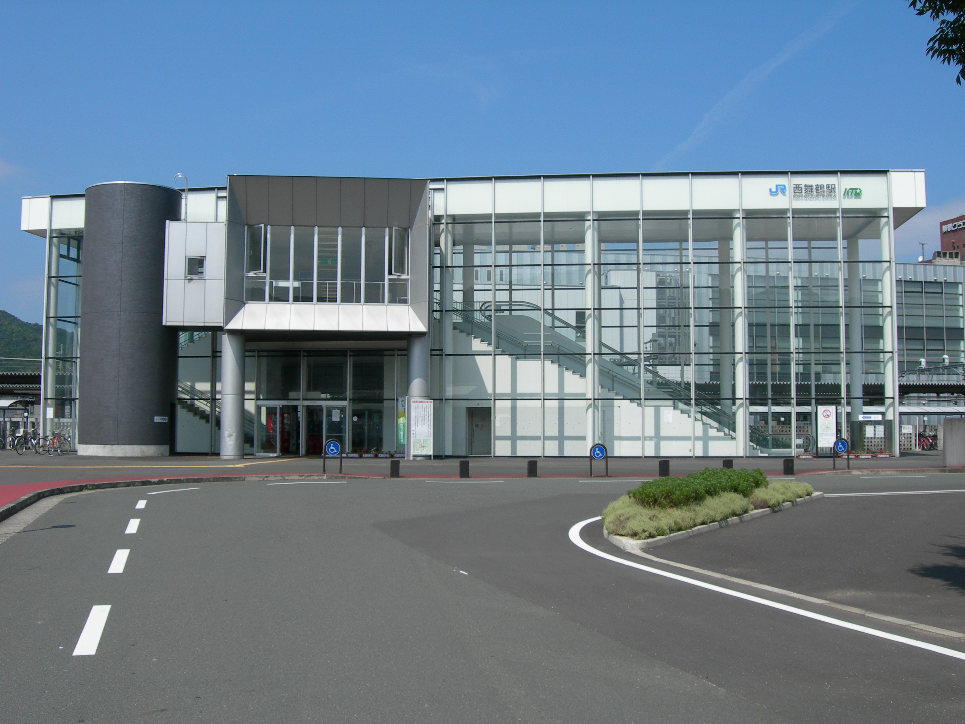 西舞鶴駅東口